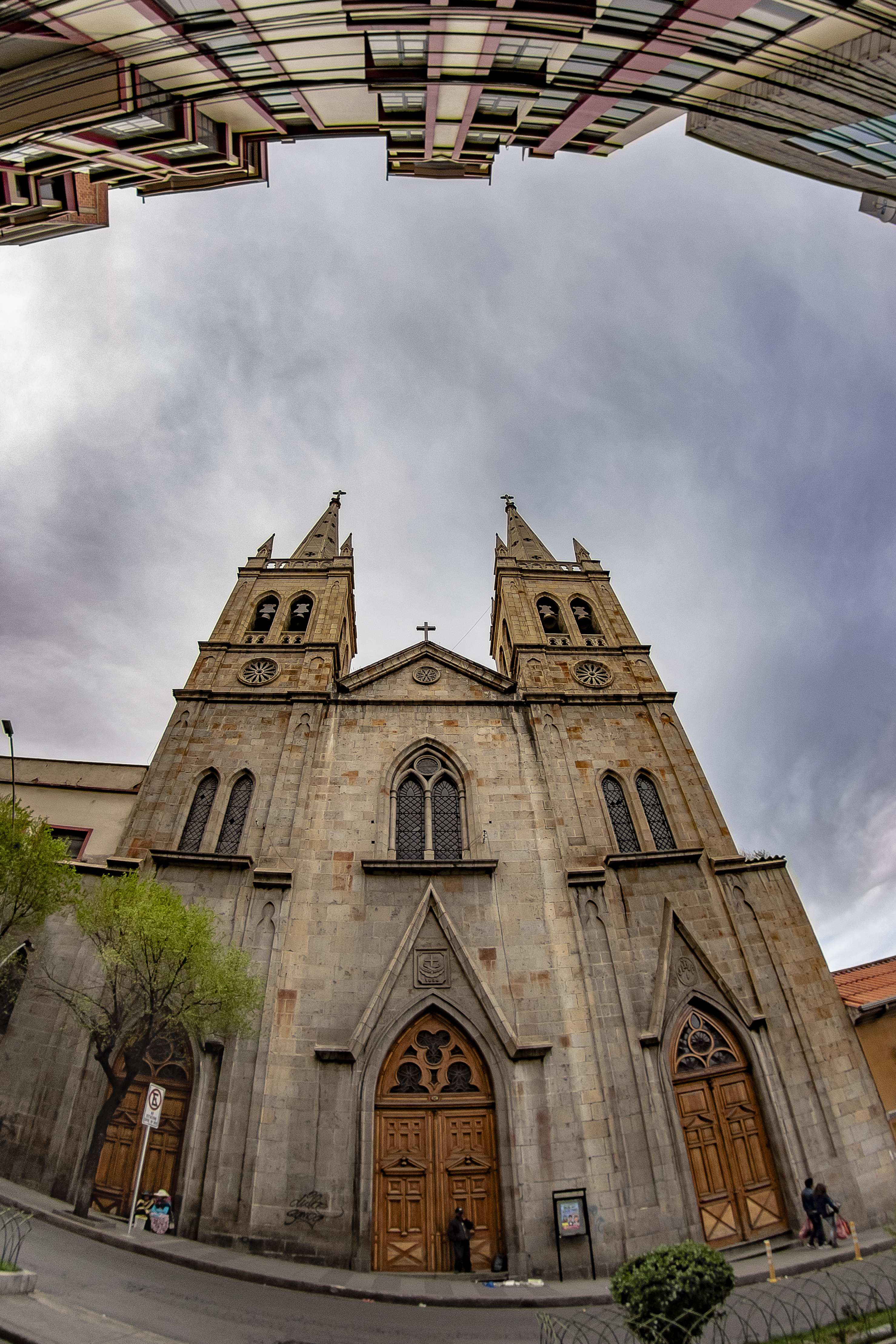 Iglesia de la Recoleta This medium shows the protected monument with the number L/00-321 in Bolivia.